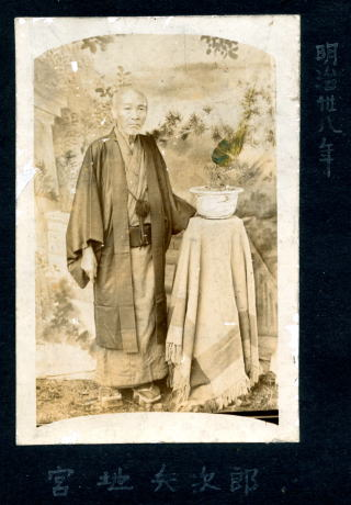 明治丗八年 宮地兵次郎